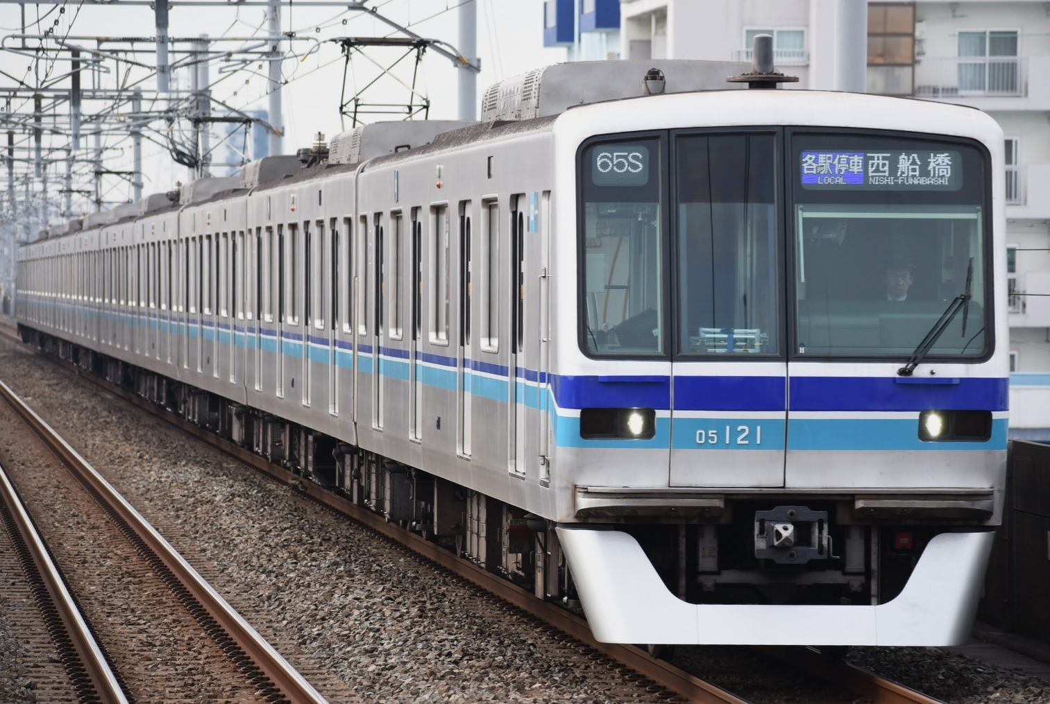 東京メトロ05系05-121F @行徳駅